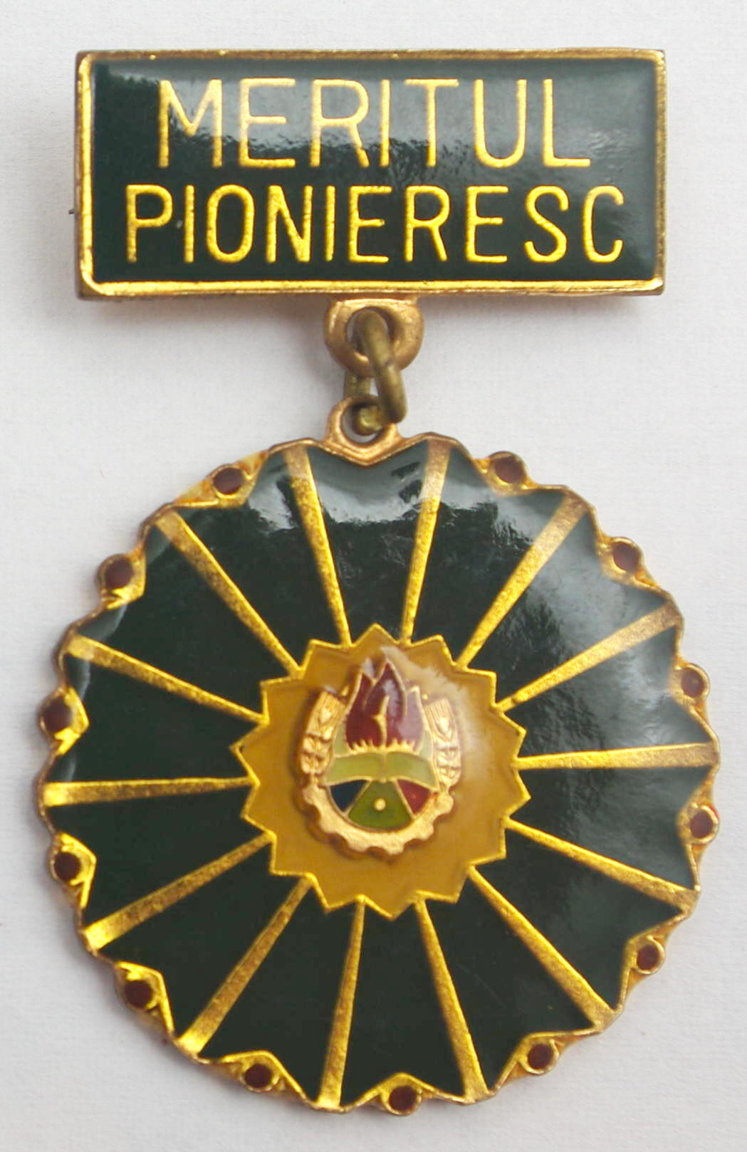 Romani: Insigna "Meritul pionieresc"